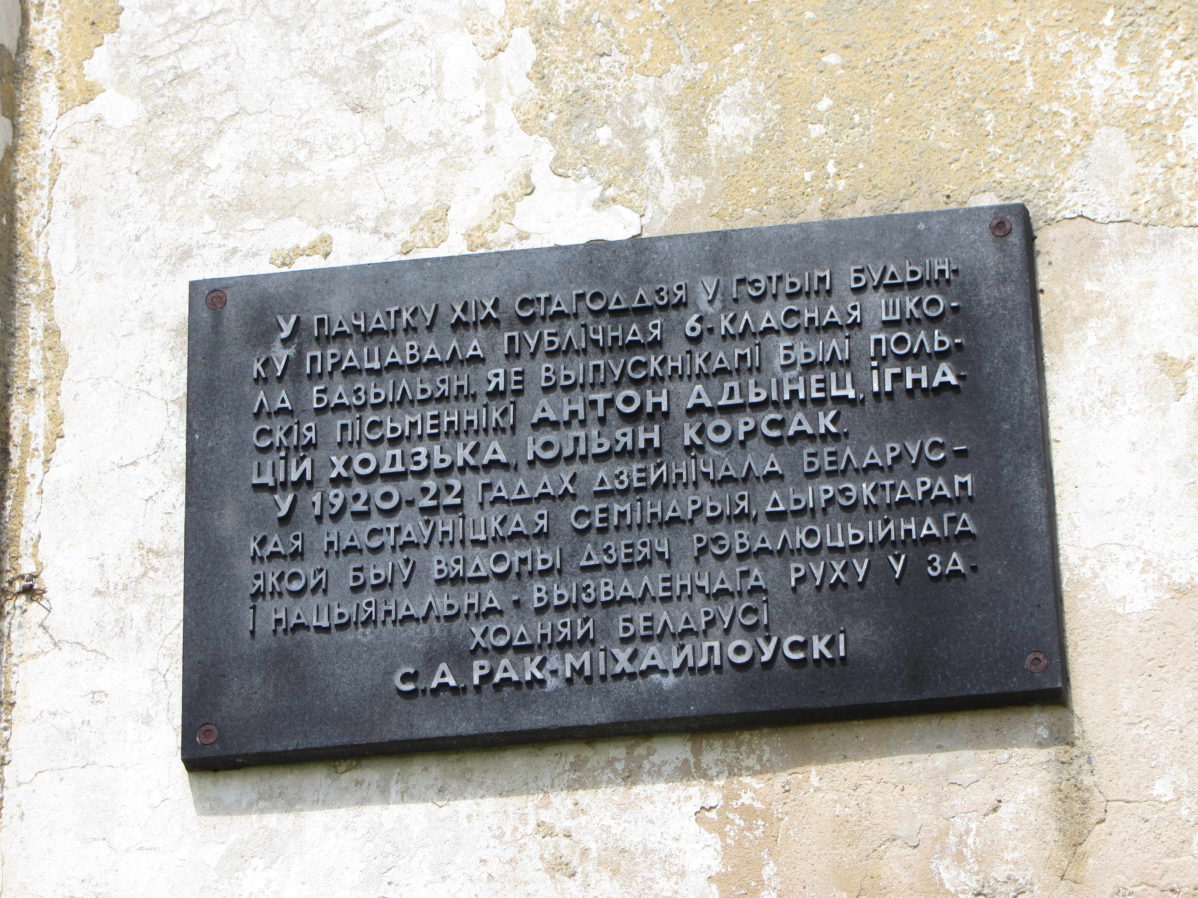 Беларуская (тарашкевіца): Шыльда на манастыры базылянаў у Барунах, 2014 год